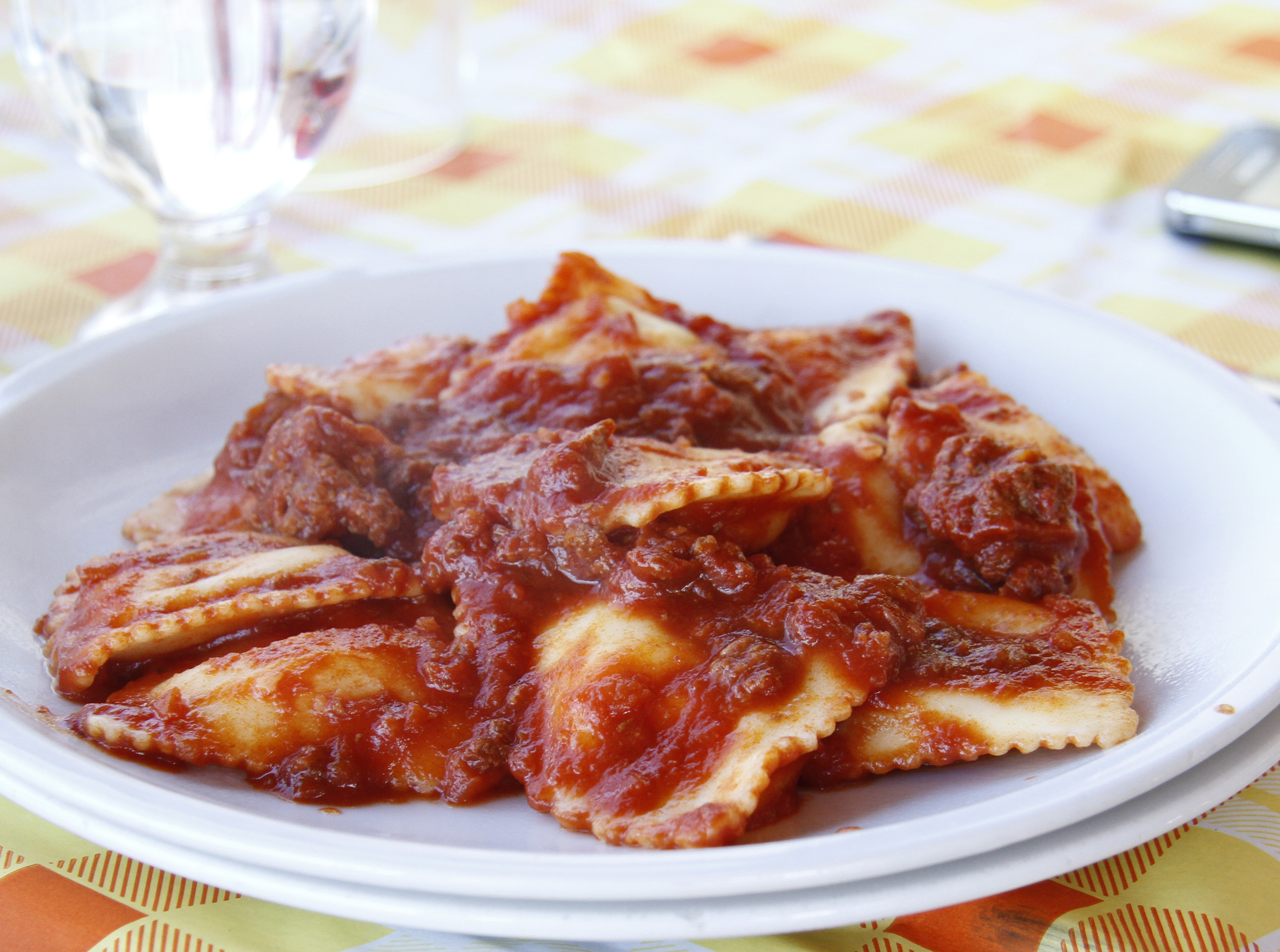 Pasta fresca, ravioli, Noto, Sicilia.